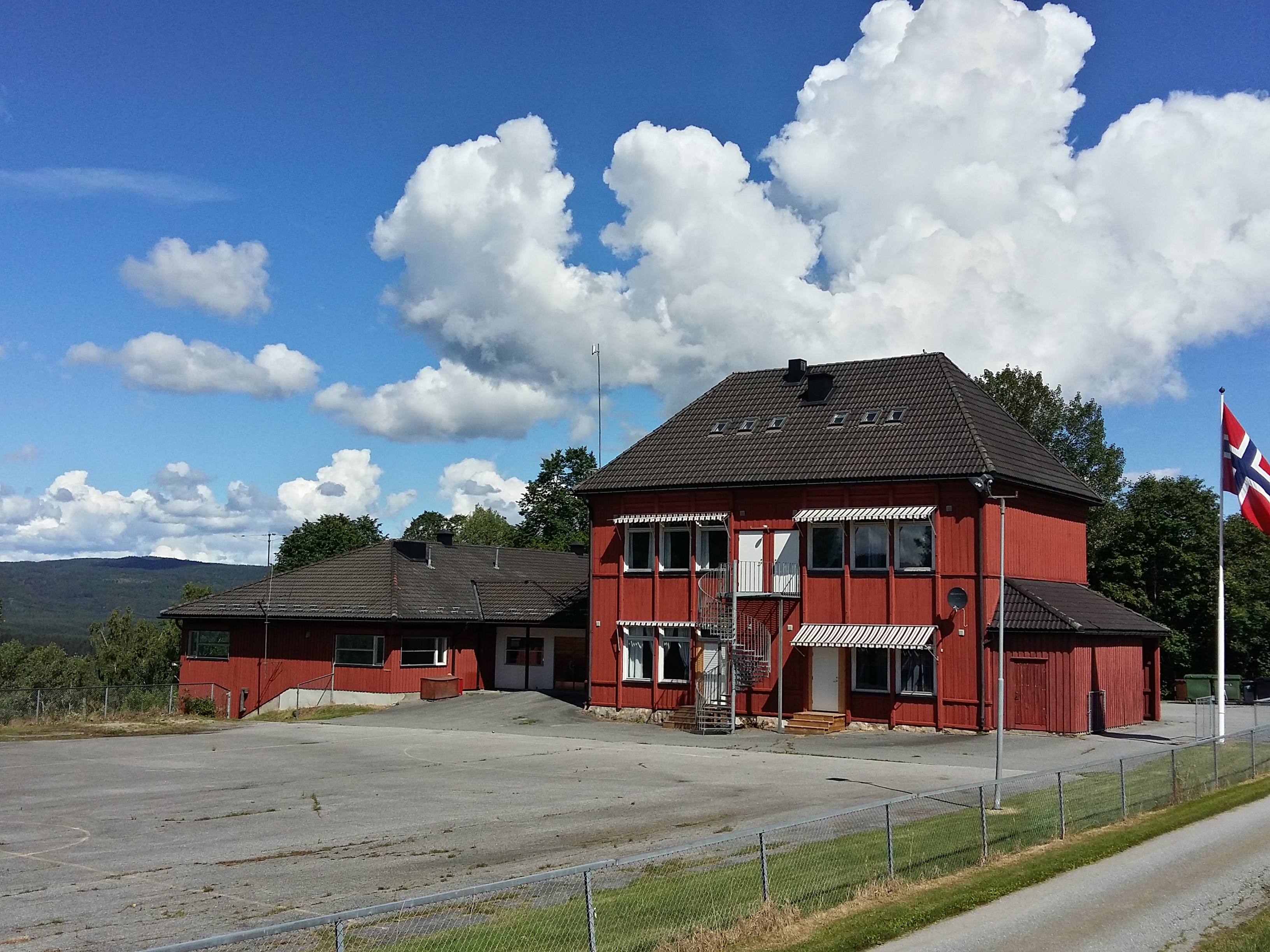 Åsbygda skole i Ringerike, nedlagt i 2007.